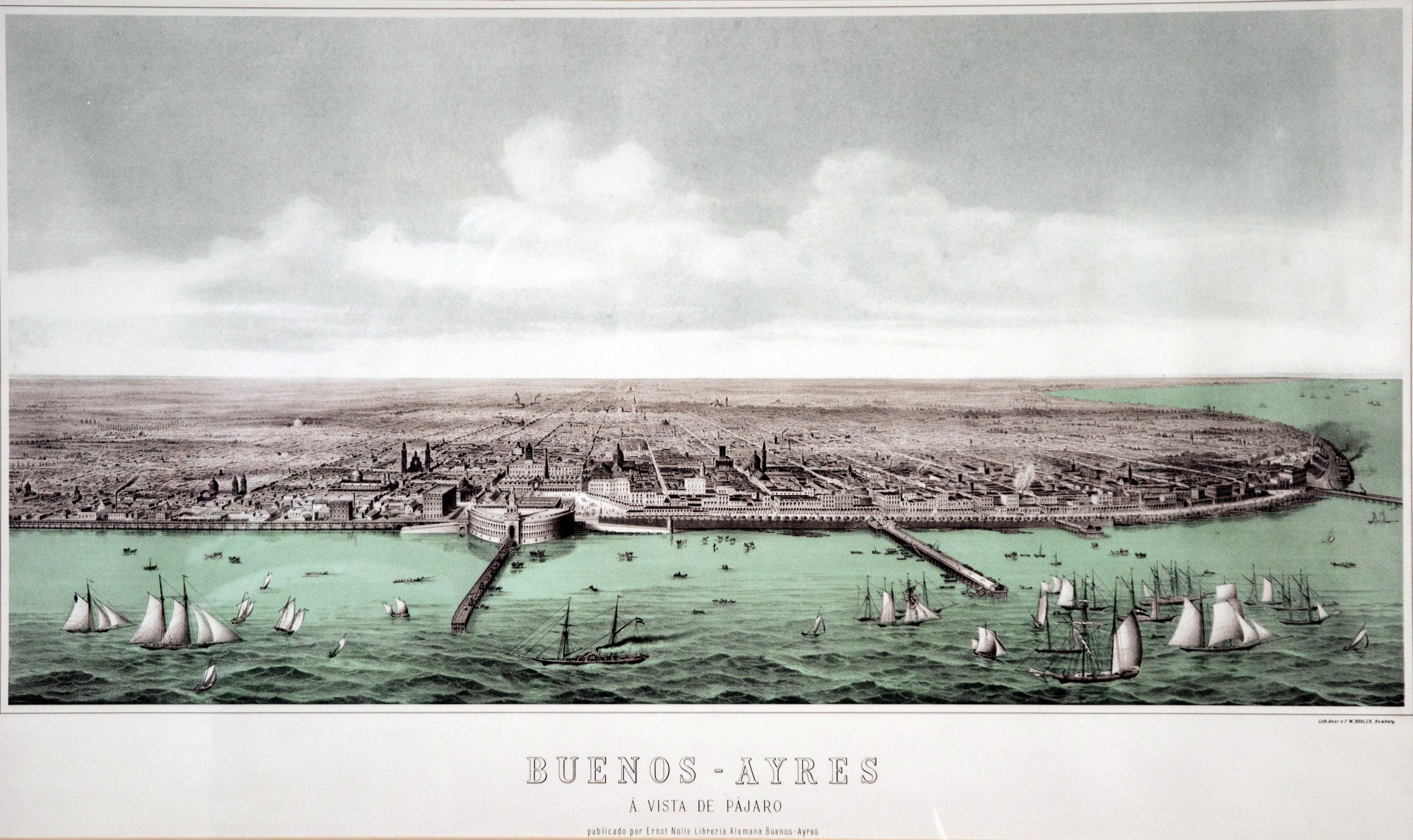 En el centro aparece el edificio de la Aduana Taylor (o Aduana Nueva), con su muelle. En el río se observan carretas para el desembarque de pasajeros y mercaderías, así como navíos a vela y a vapor.